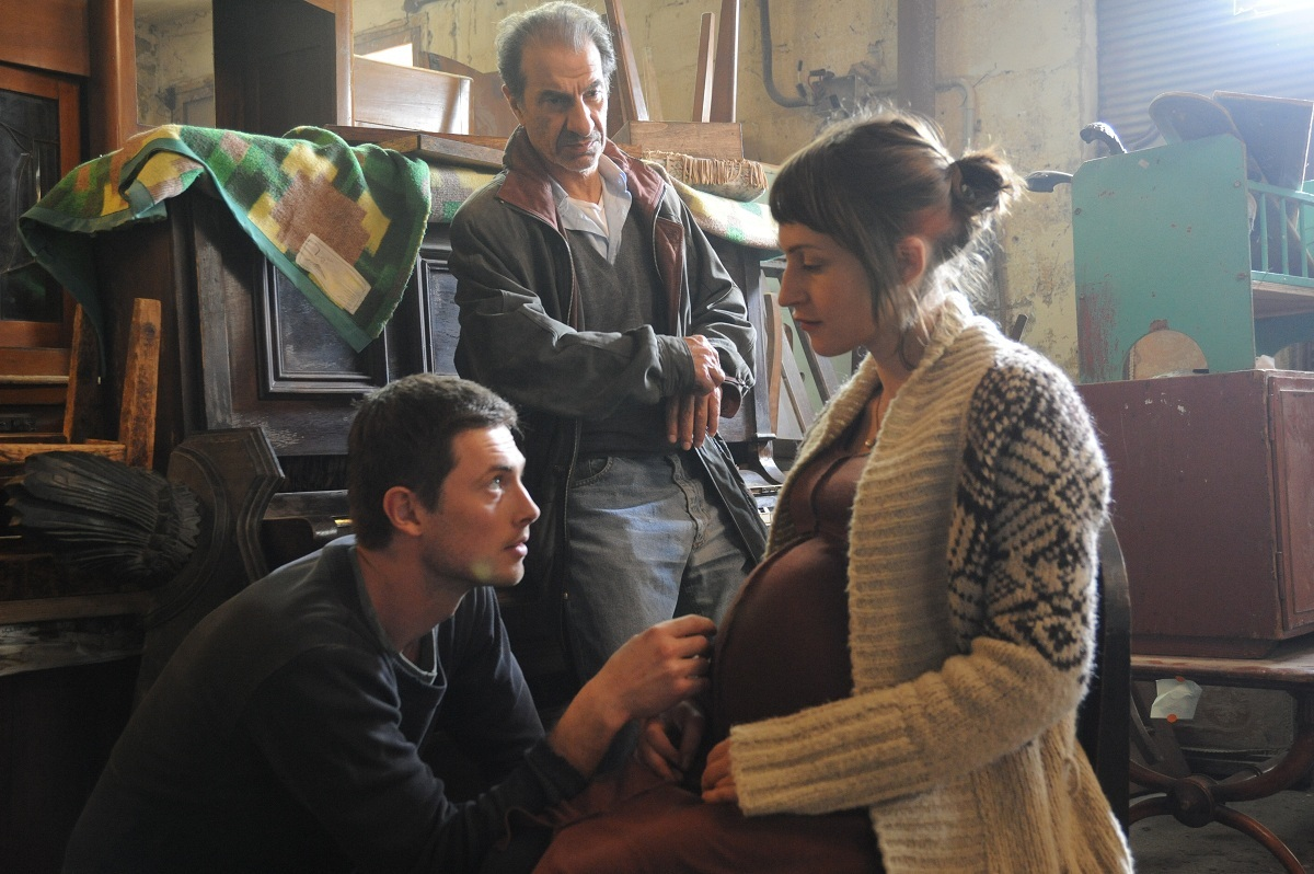 מתוך הסרט בוקר טוב אדון פידלמן